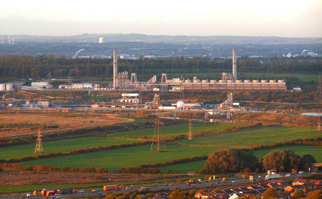 Rocksavage over M56